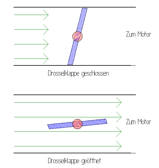 Valvola a Farfalla